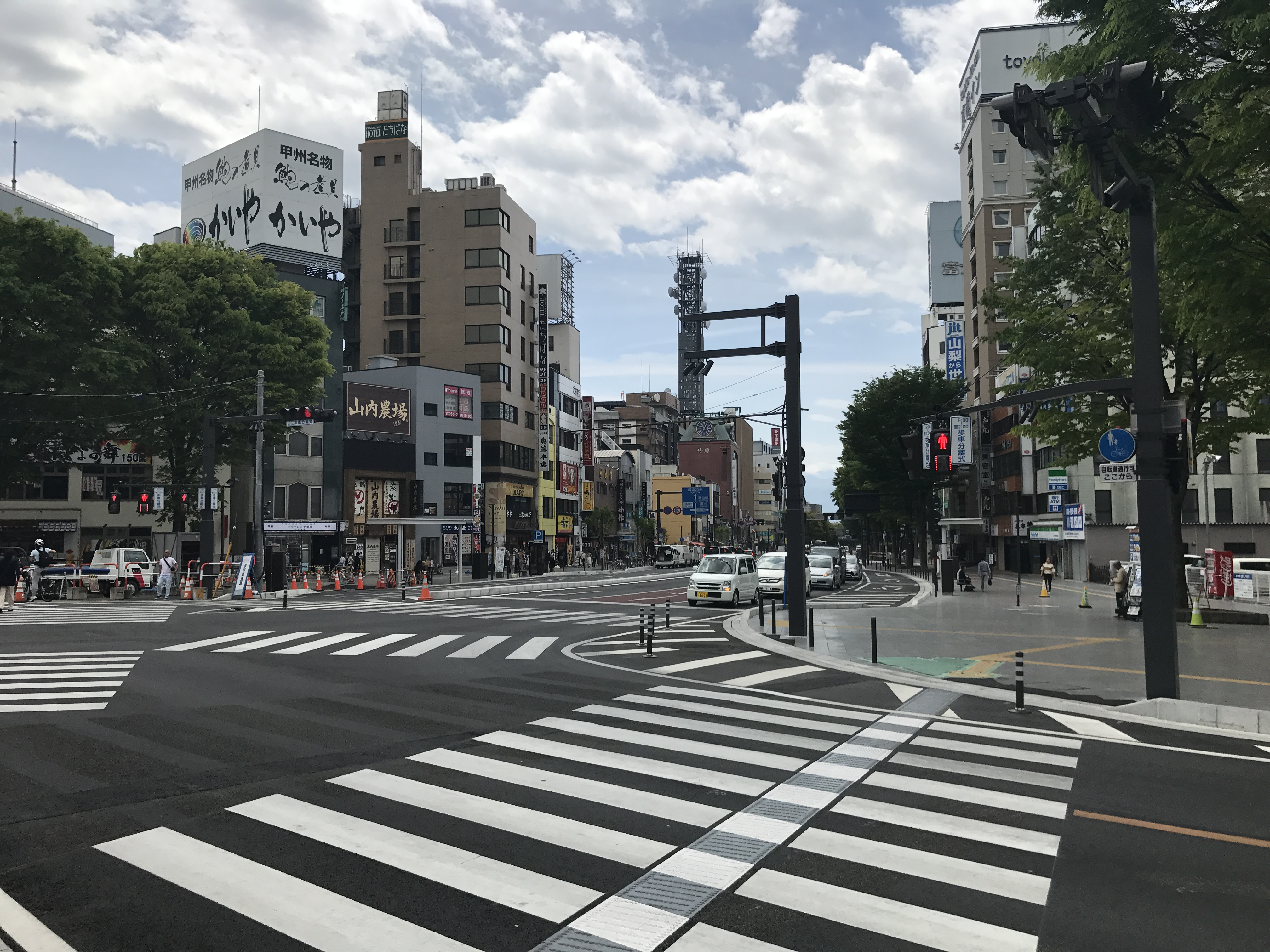 甲府平和通り